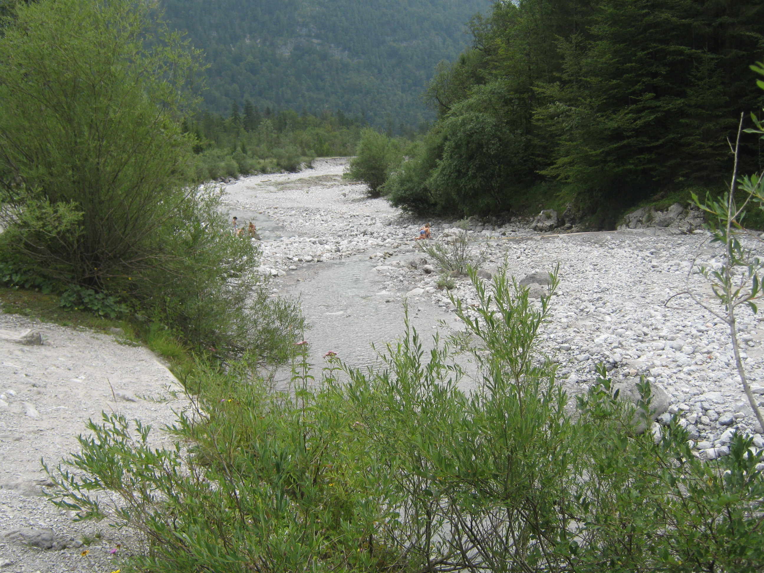 Eisbach auf der Königssee-Halbinsel Hirschau, südlich von St. Bartholomä, mit Schwemmfächer